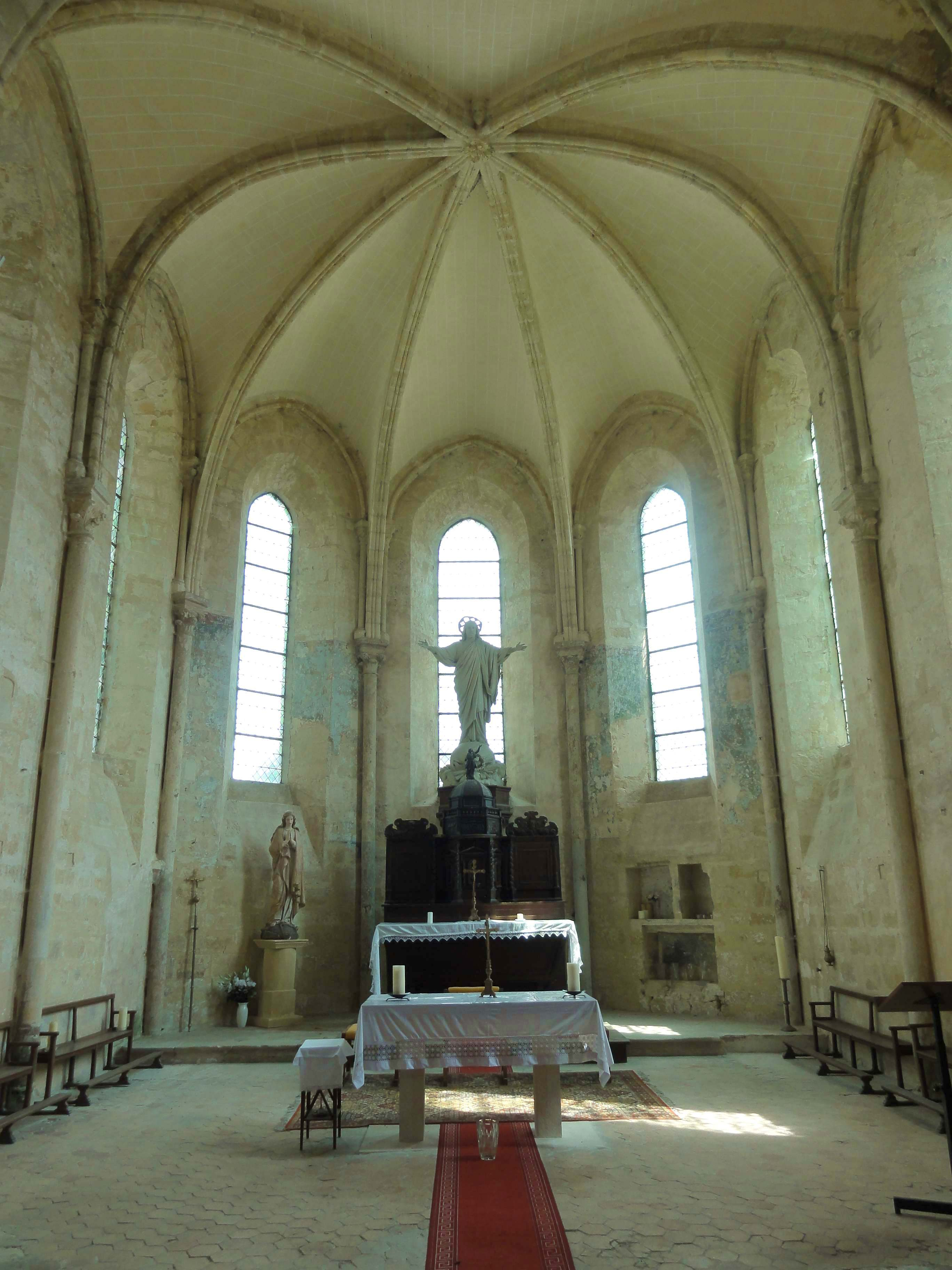 Intérieur de l'église (voir titre).